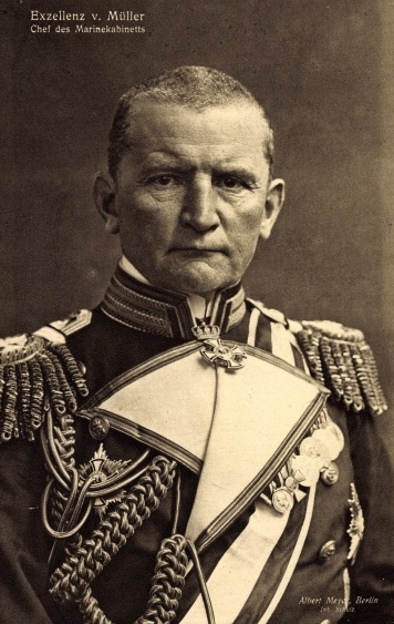 Admiral Georg Alexander von Müller